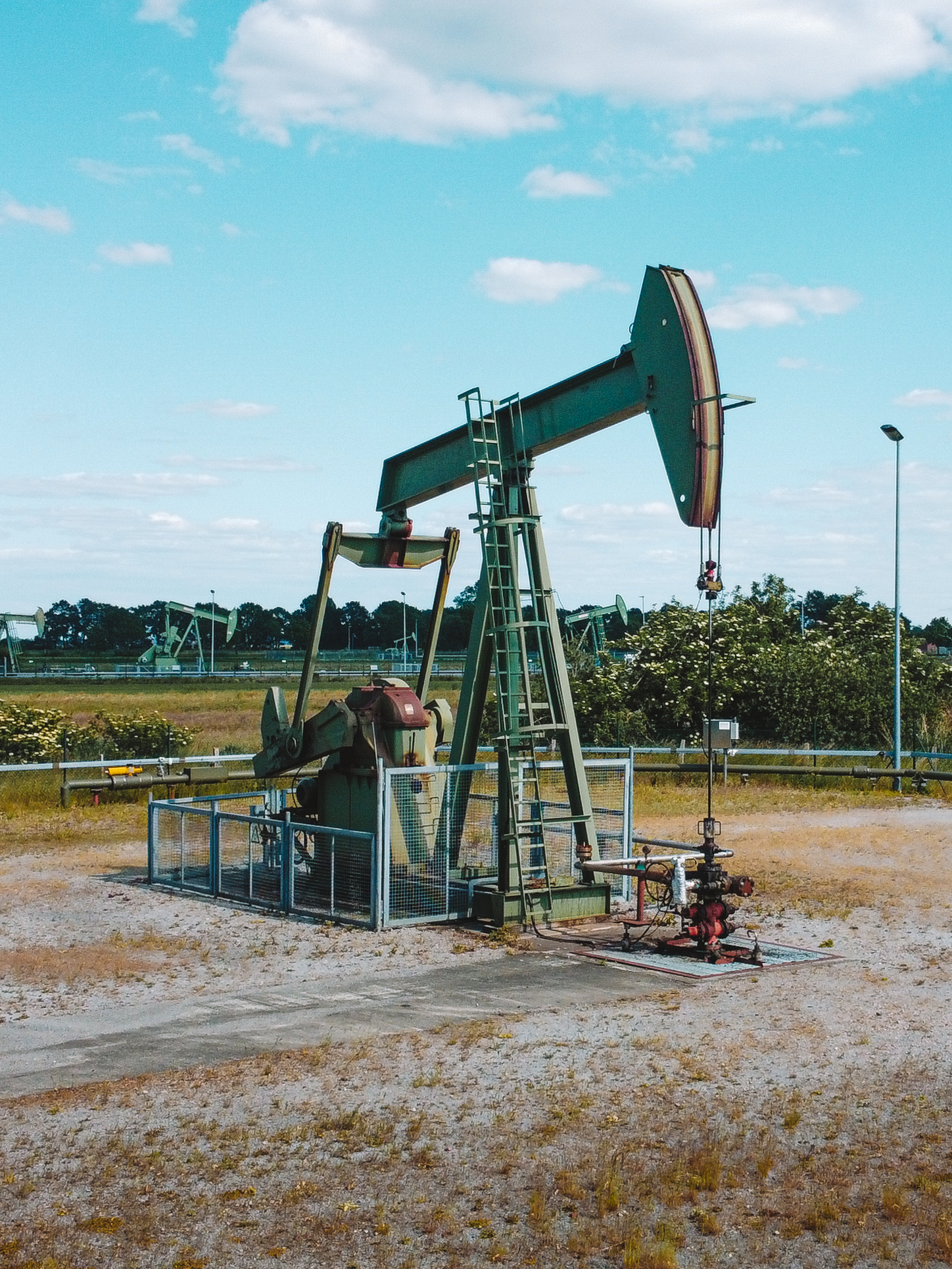 Jaknikker in de Samtgemeinde Emlichheim 2020